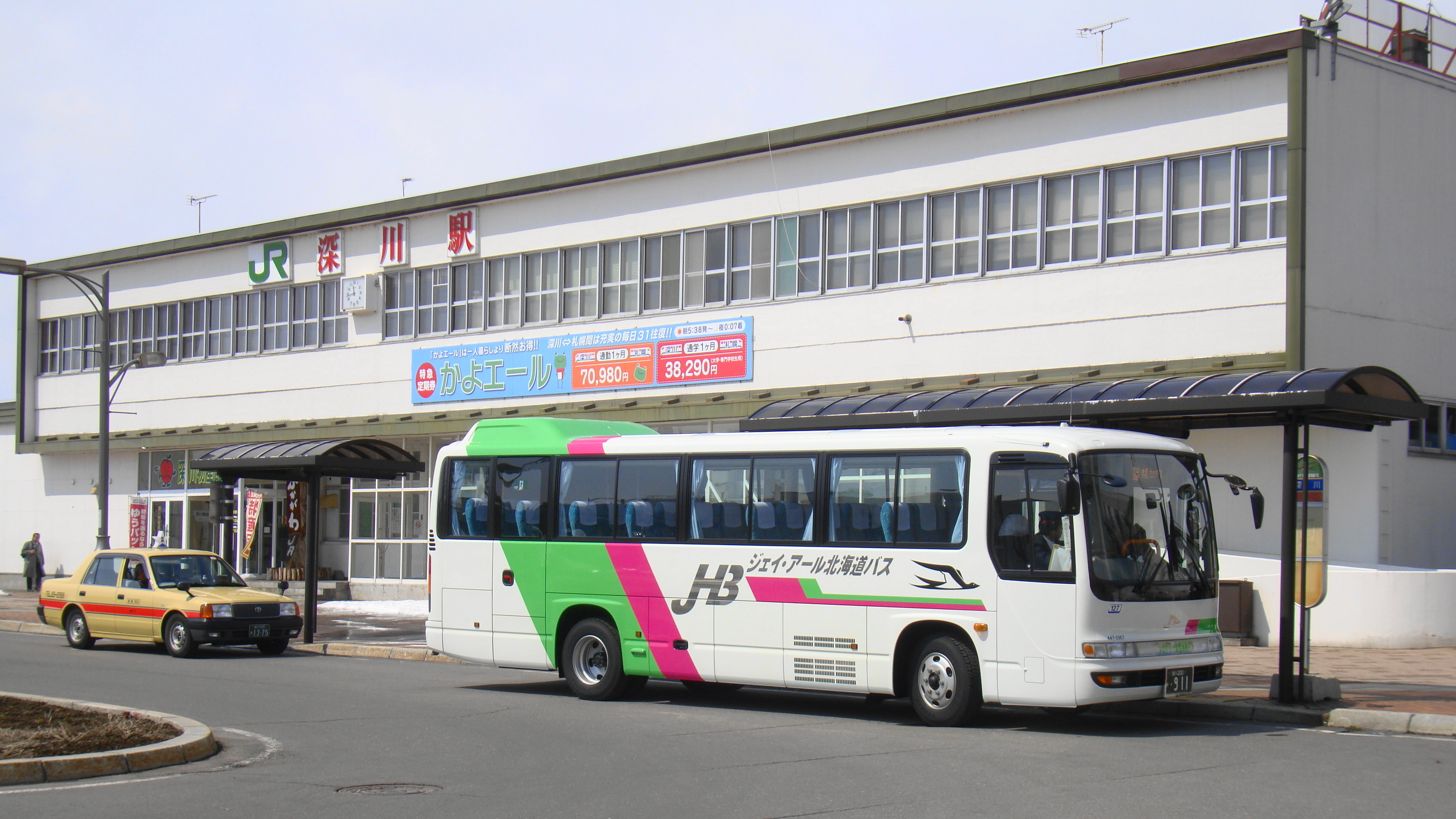 Fukagawa to Horokanai